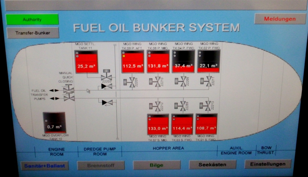 MKR, Bunkersystem